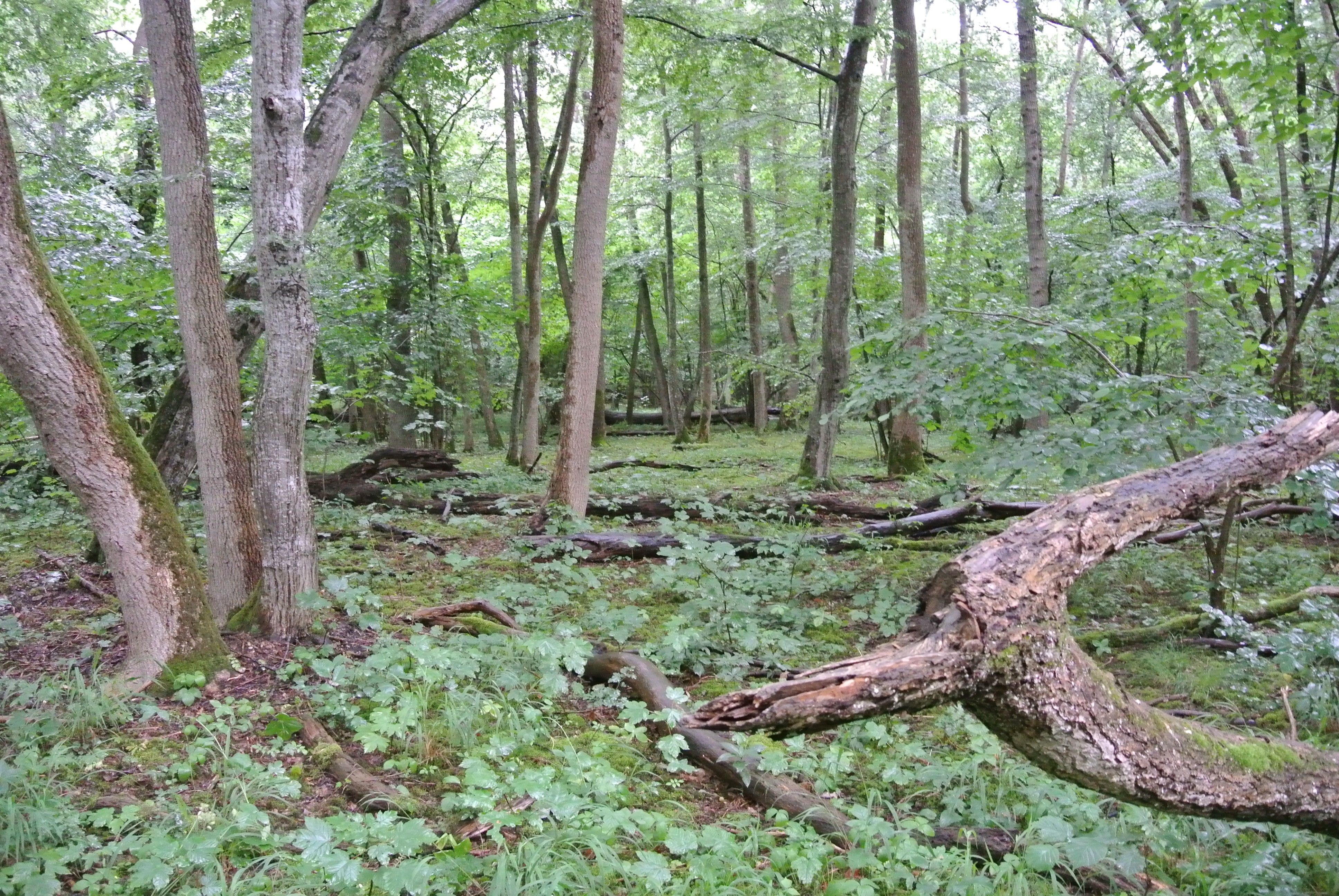 Naturschutzgebiet Echinger Lohe, NSG-00044.01, urwaldähnlicher naturnaher Laubmischwald, ein Relikt der früheren Bewaldung der Münchner Schotterebene